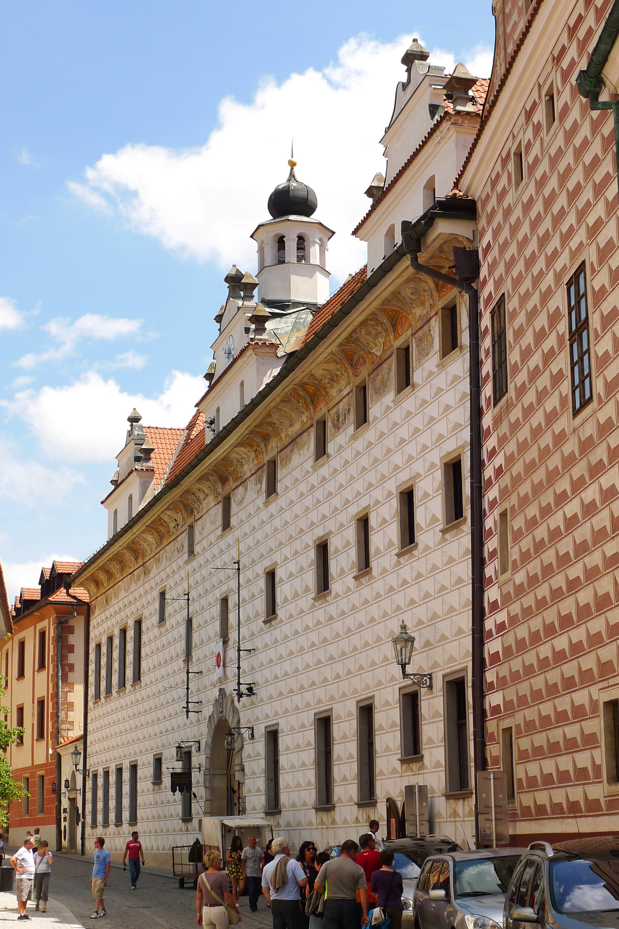 Kolej jezuitská (býv.) (Český Krumlov), Horní 154, Český Krumlov